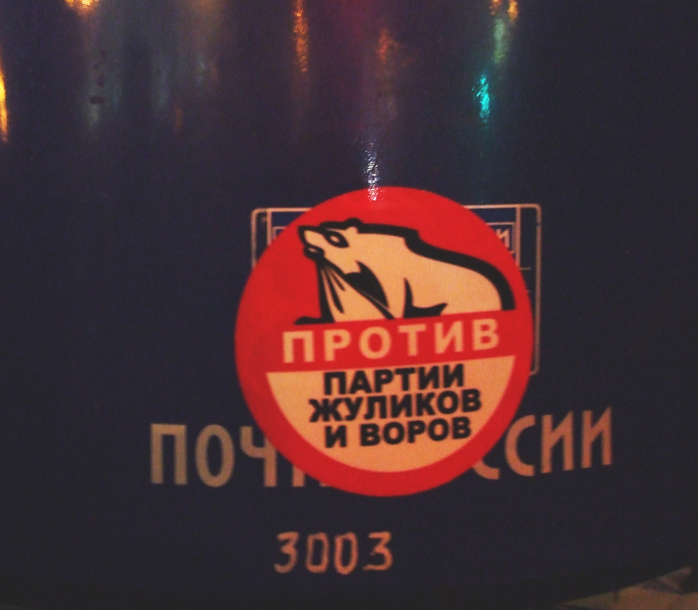 Митинг на Чистых прудах 5 декабря 2011